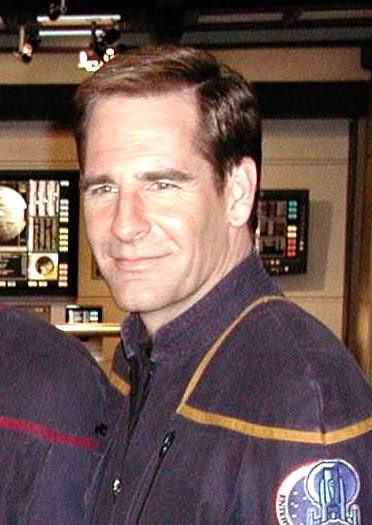 Johnatan Archer